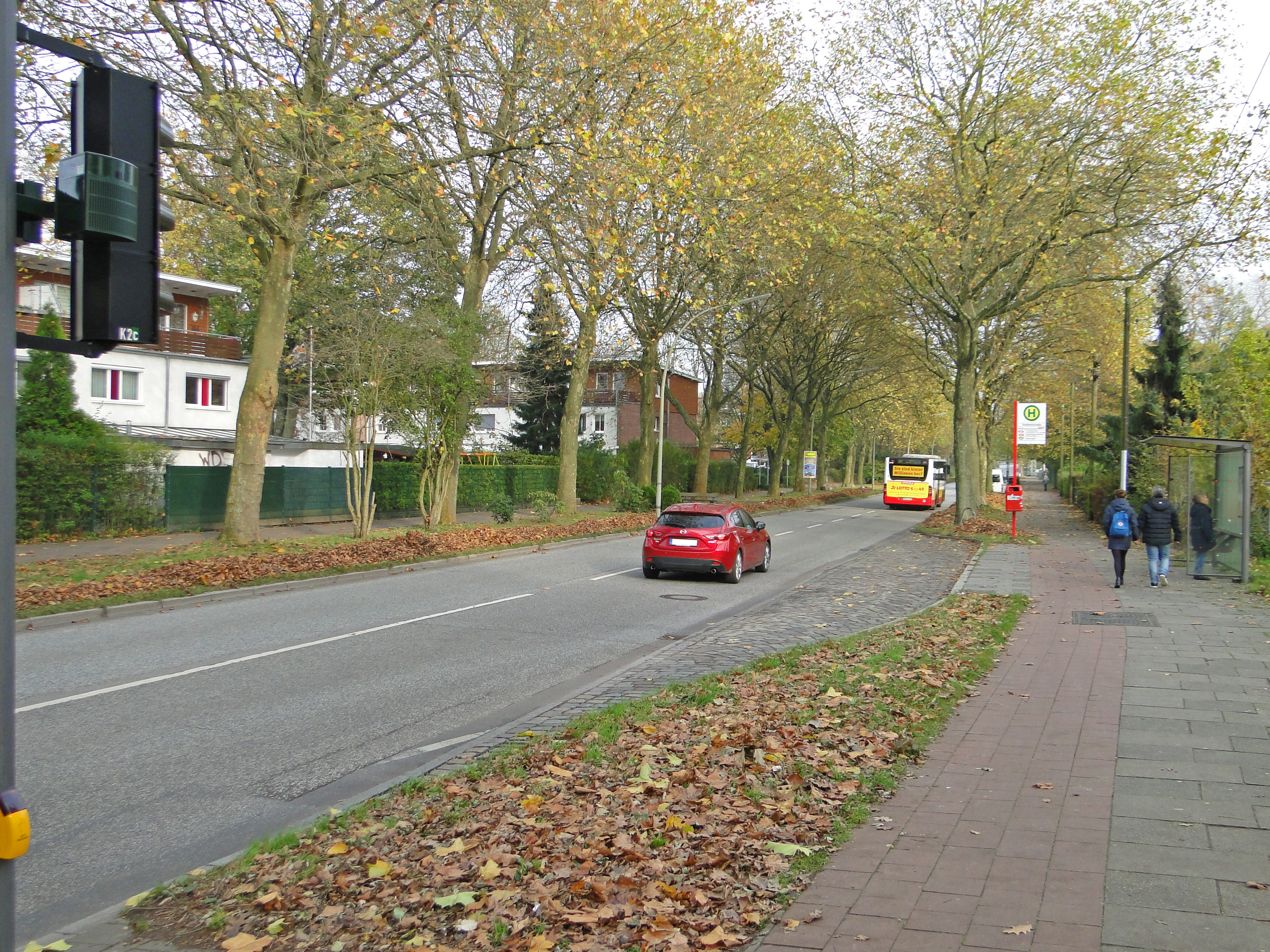 Bushaltestelle Stoltenstraße. Vorgesehener Standort des U-Bahnhof Stoltenstraße